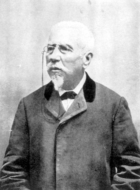 Manuel Murguía.